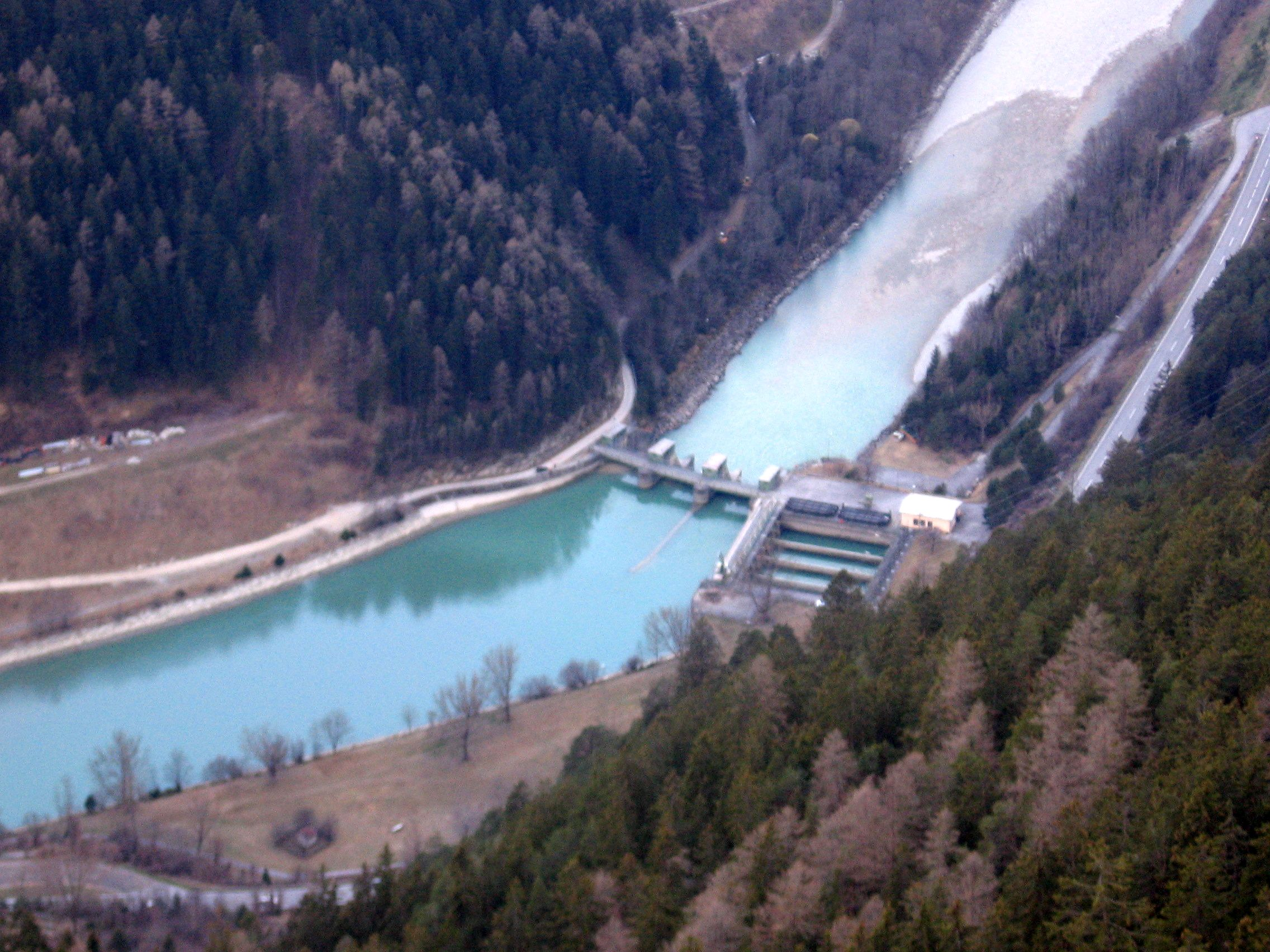 Kraftwerk am Inn nahe Dorf Fließ, Gemeinde Fliess im Oberinntal.